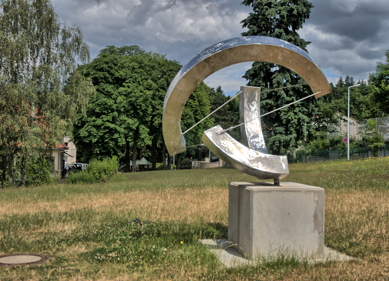 Skulptur "Kreisteilung kugelig" (2012) von Matthias Will. Standort: Schulzentrum Marienhöhe, Auf der Marienhöhe 32, Darmstadt